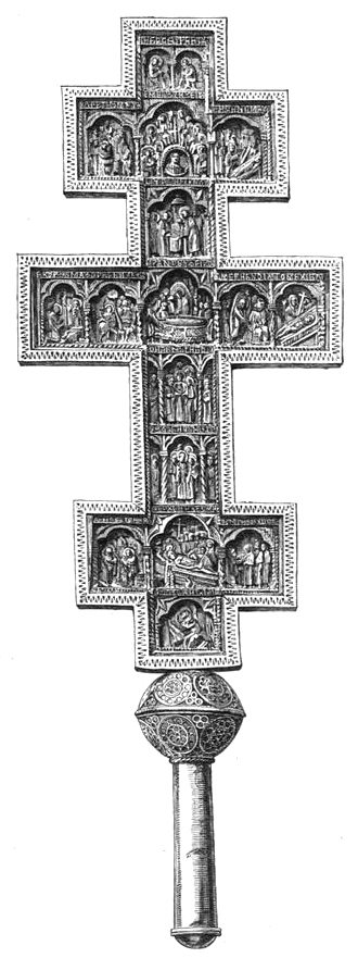 Ручний хрест подарований молдавським господарем Олександром IV Лопушанином до собору собор святого Івана Хрестителя в Перемишлі.